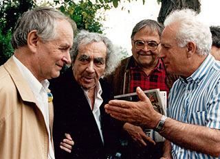 56-osok egymás közt - Vitányi Iván, Faludy György, Mécs Imre, Dornbach Alajos - Szárszói Találkozó 1994